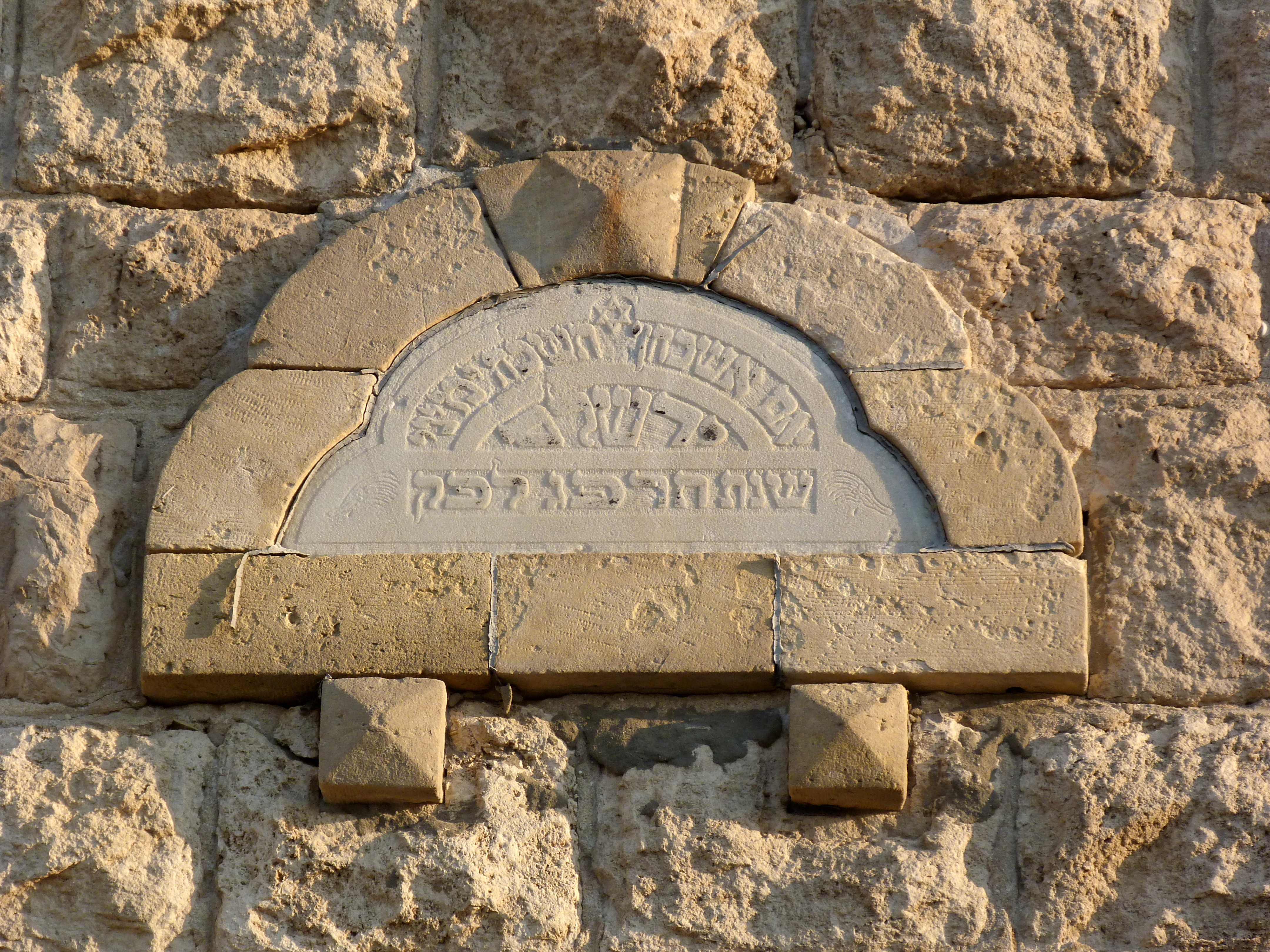 בית חמאוי בחיפה